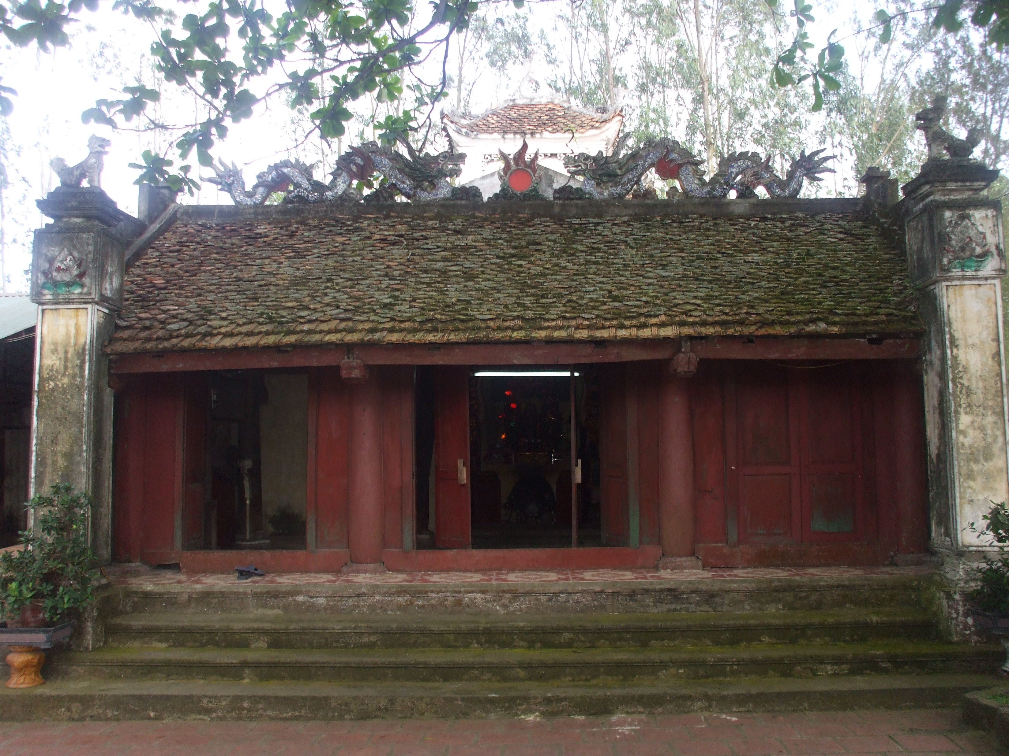 Đền thờ Tô Hiến Thành tại phường Trường Sơn, thị xã Sầm Sơn, tỉnh Thanh Hóa, Việt Nam.